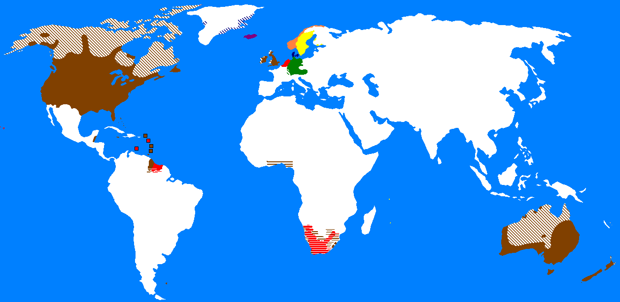 Zelf gemaakte kaart